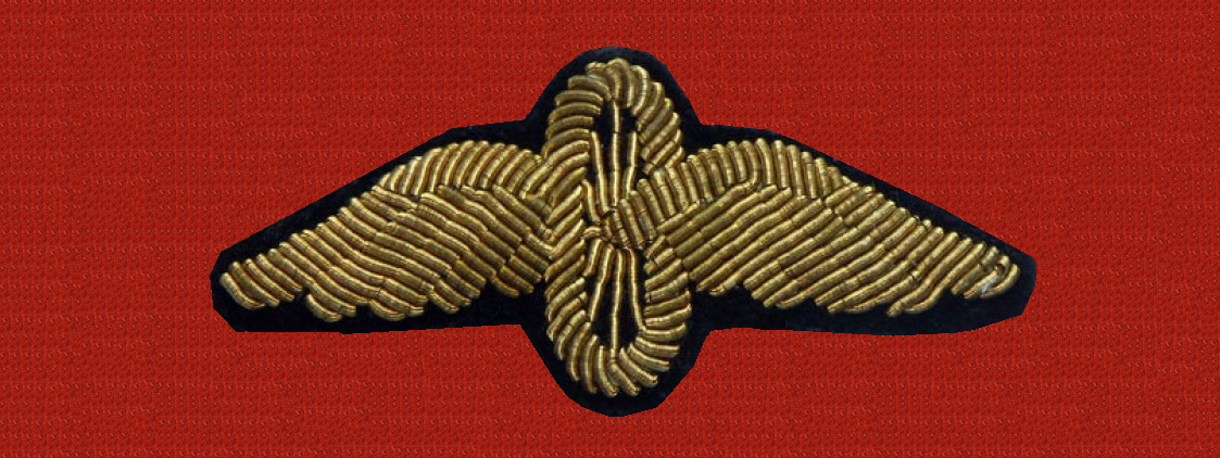 знак военных комендантов